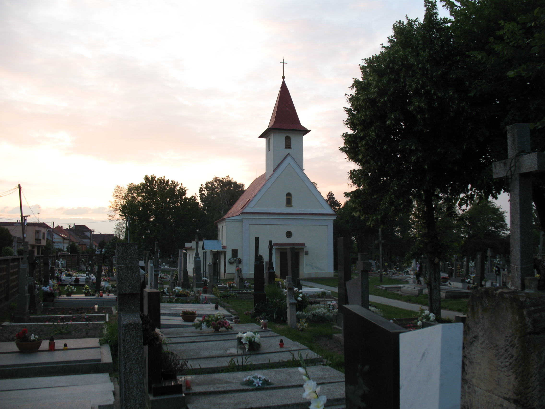 Apaj Opoj